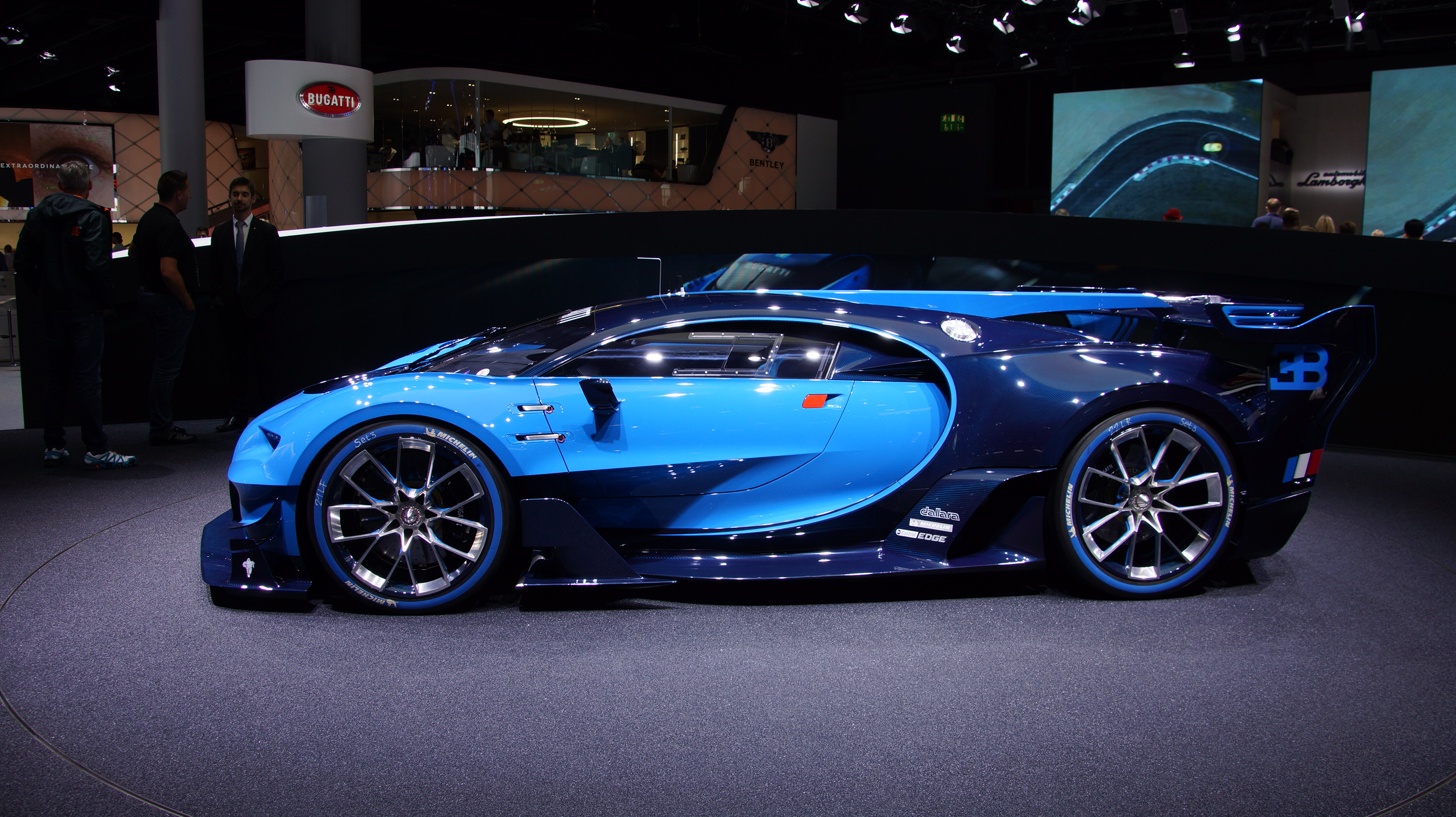 Bugatti Vision auf der IAA 2015 in Frankfurt